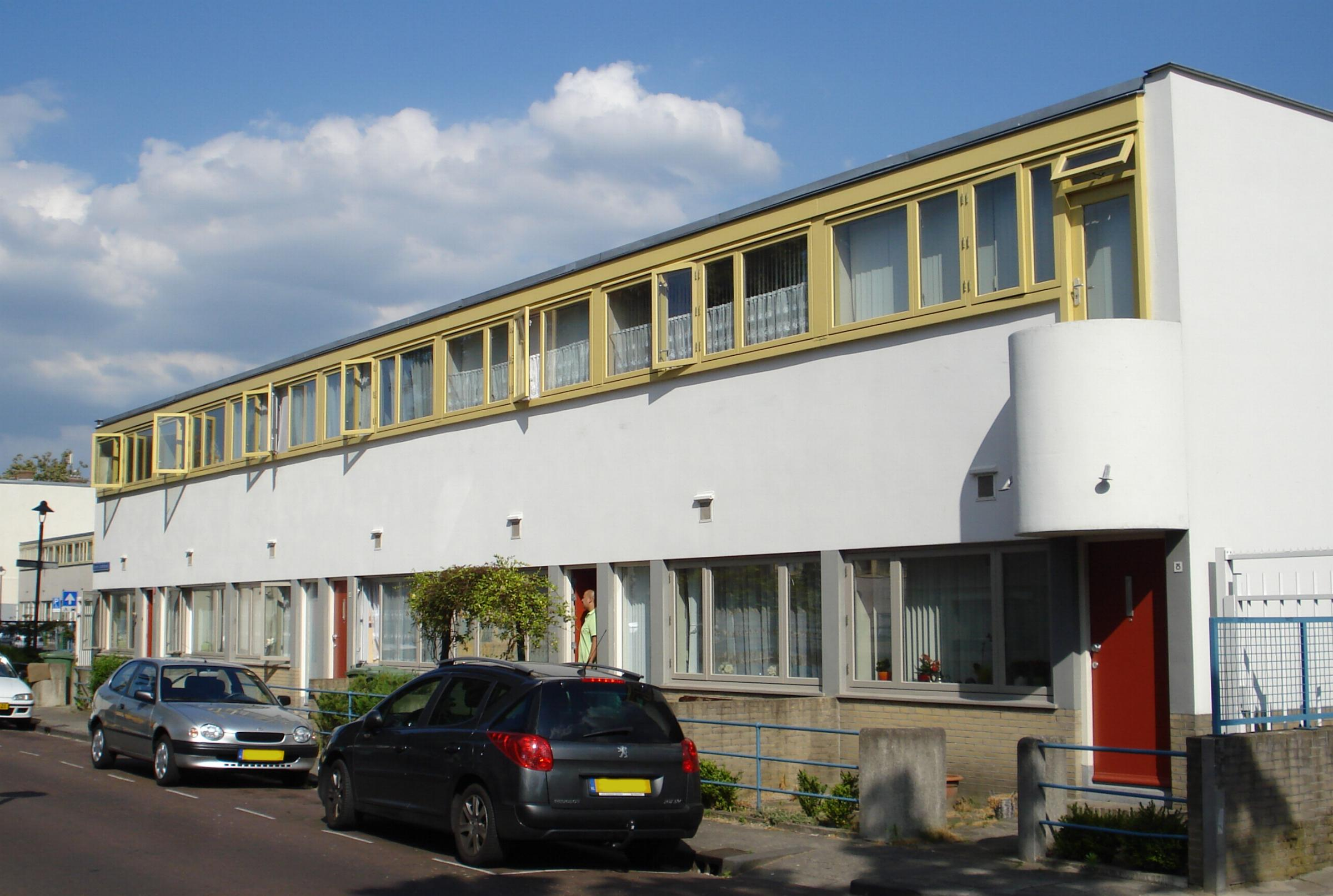 Rotterdam, Groote Lindtstraat 2-8. Rijksmonument.